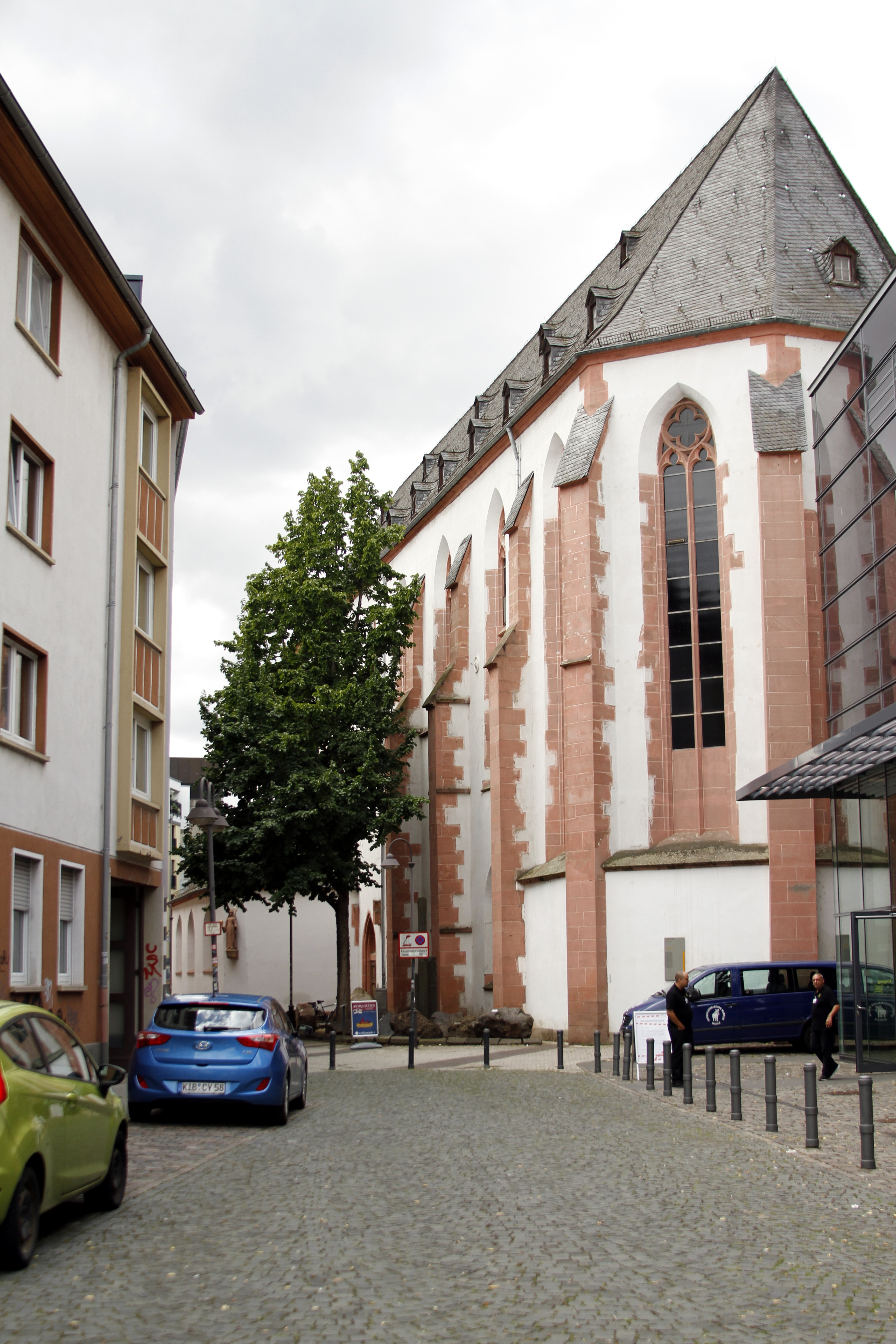 Reichklarenkloster - Mainz - Germany